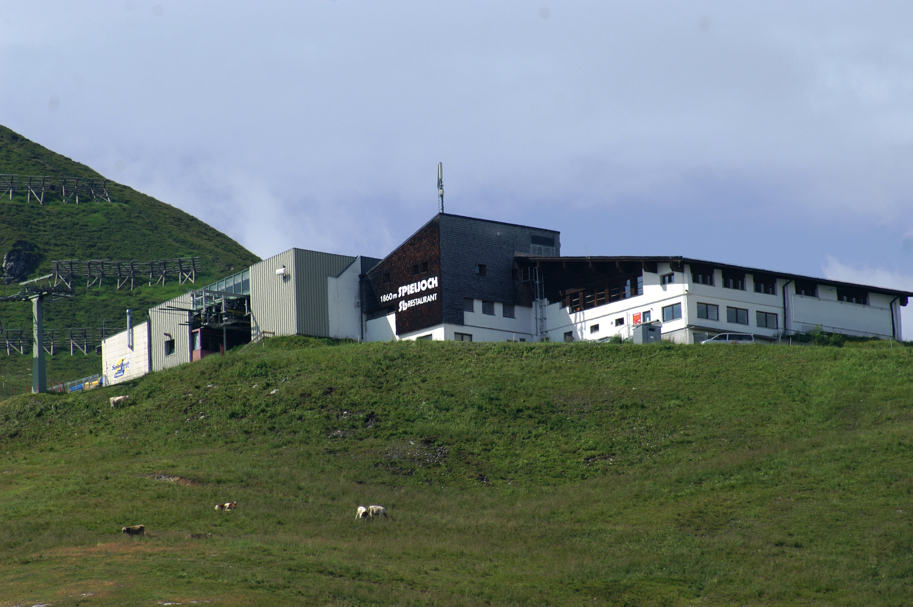 Bergstation Spieljochbahn bei Fügen im Zillertal, Tirol